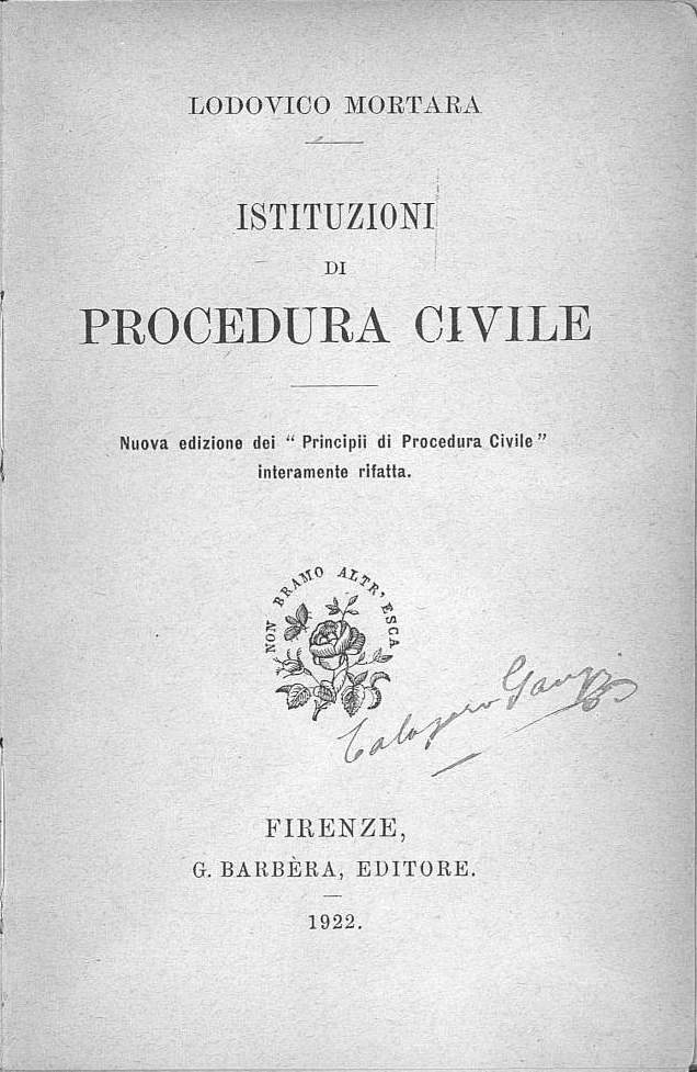 Frontespizio